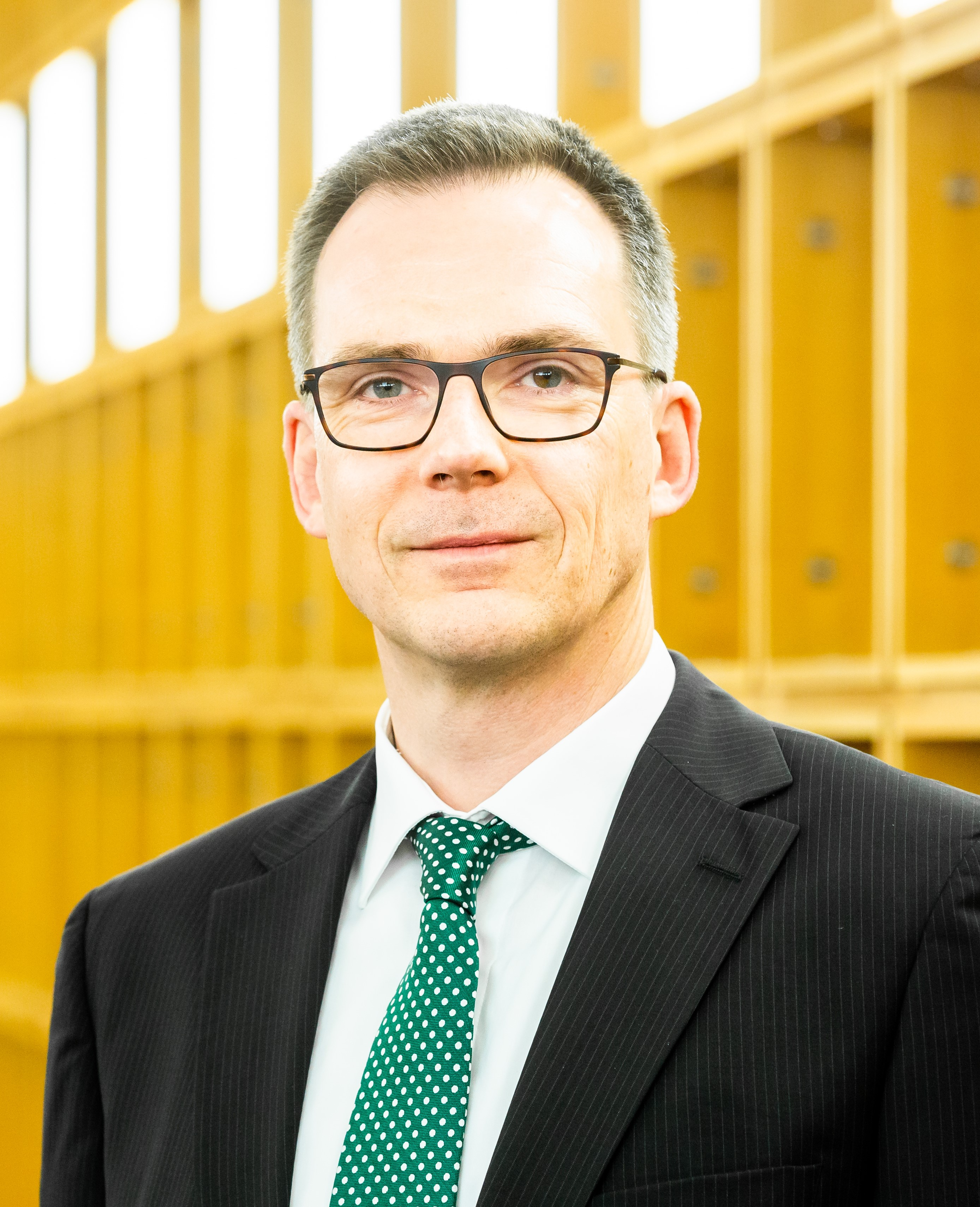 Dieter Bathen (2019)